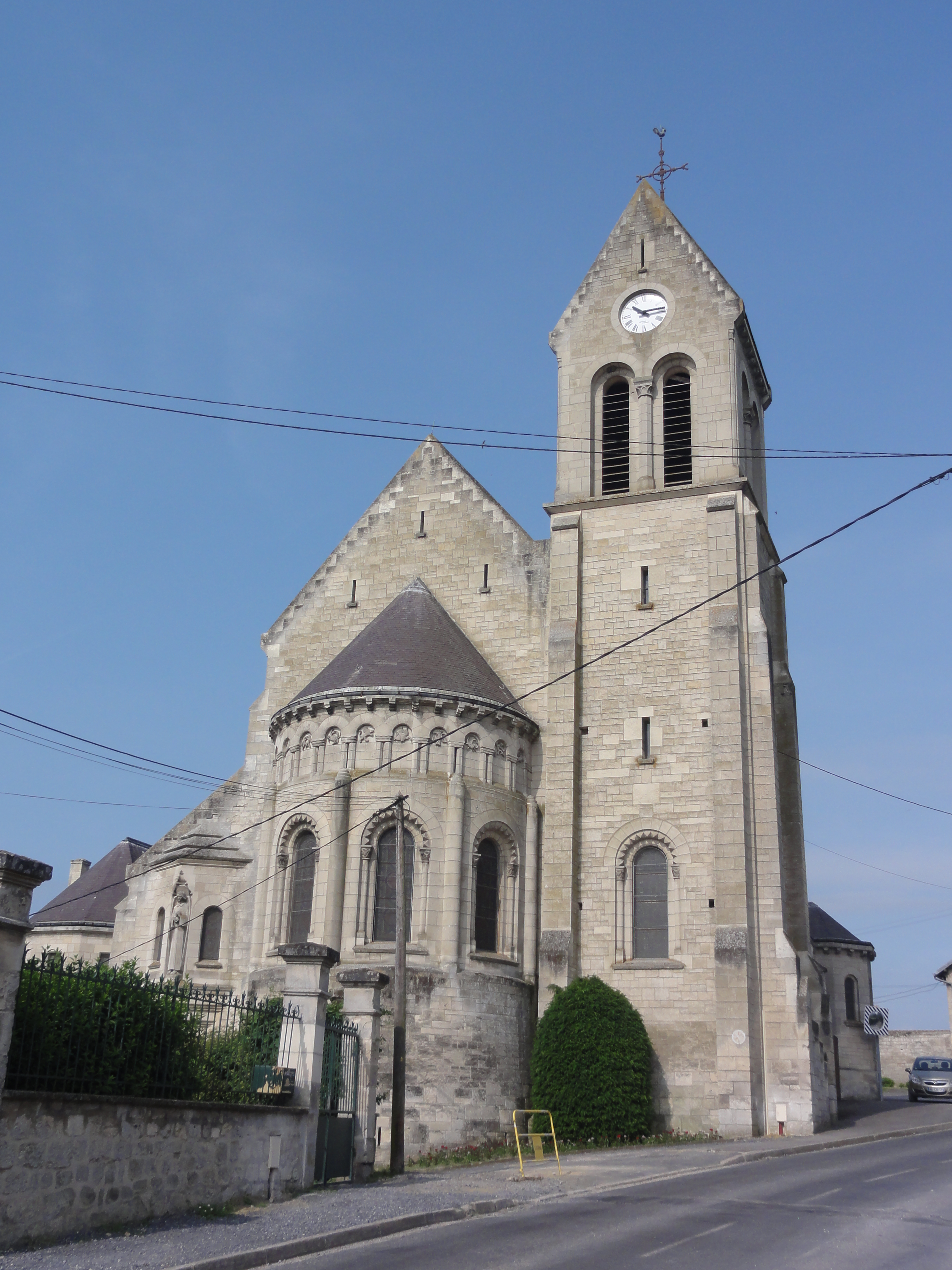 Fontenoy (Aisne) Église